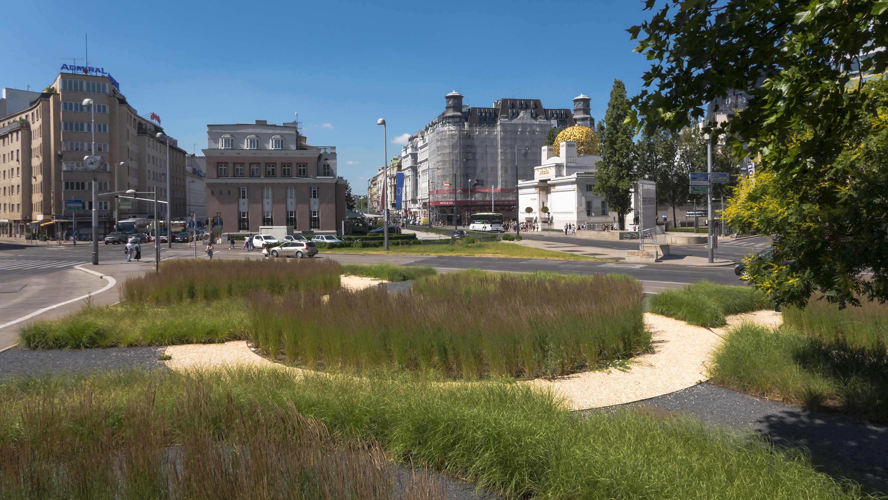 Esperantopark in Wien 1